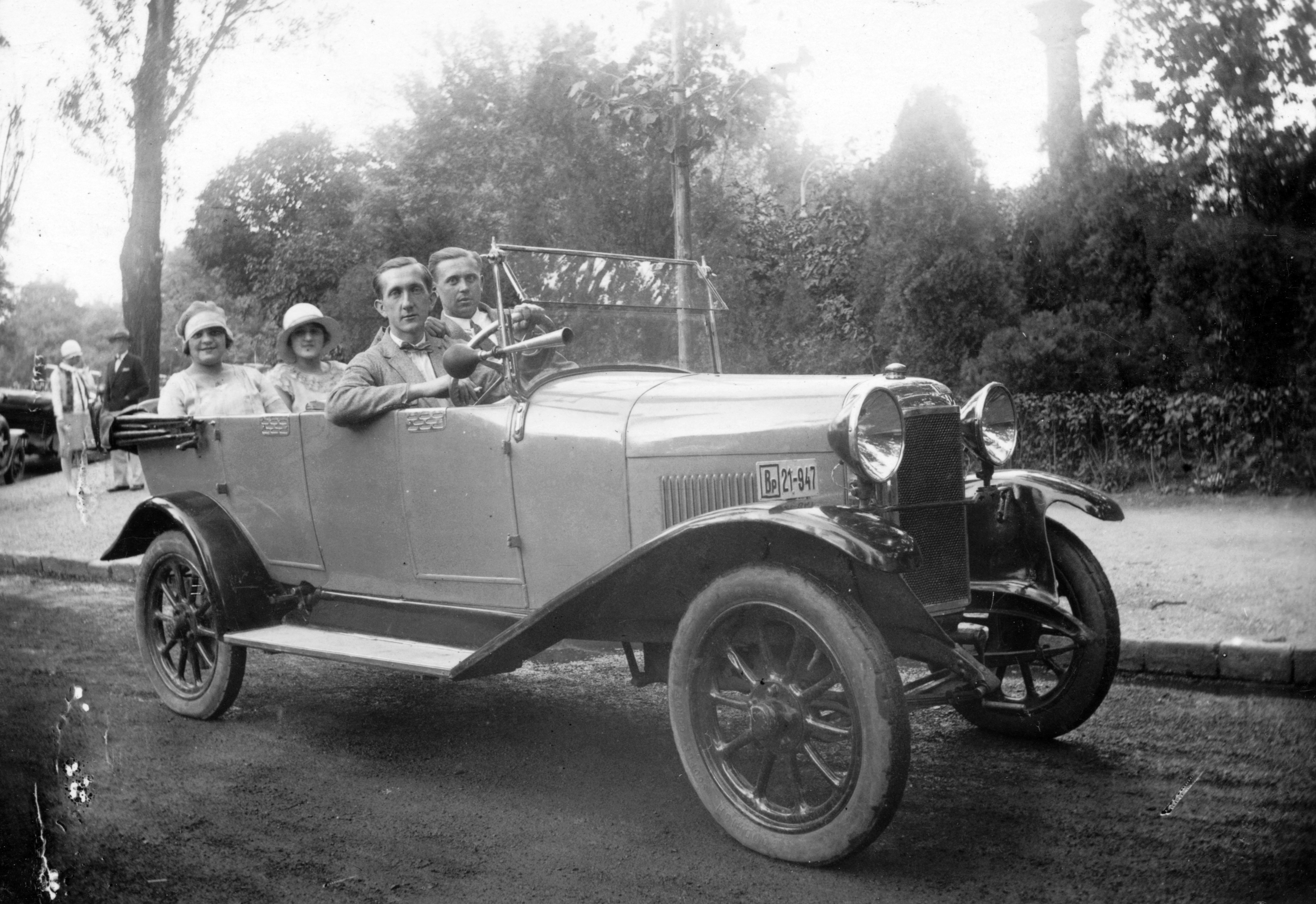 Chiribiri típusú személygépkocsi. Tags: Italian brand, Chiribiri-brand, automobile Title: Chiribiri típusú személygépkocsi.